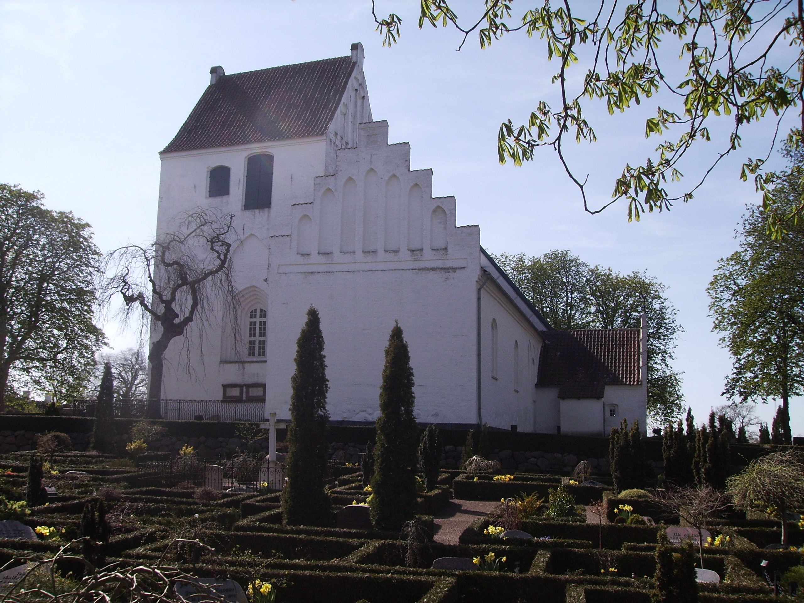 Sankt Mikaels Kirke, Sønder Nærå Sogn, Åsum Herred, Odense Amt, Denmark (Danish Church) - Sankt Mikaels Kirke fra nordøst